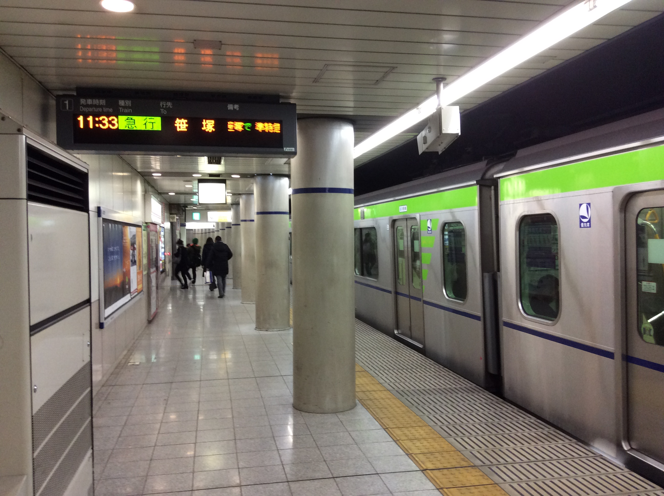 京王新線 幡ヶ谷駅